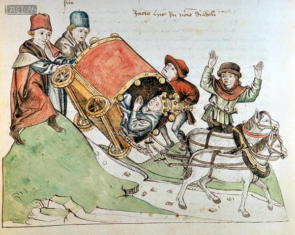 Aus: Konzilchronik des Ulrich Richental